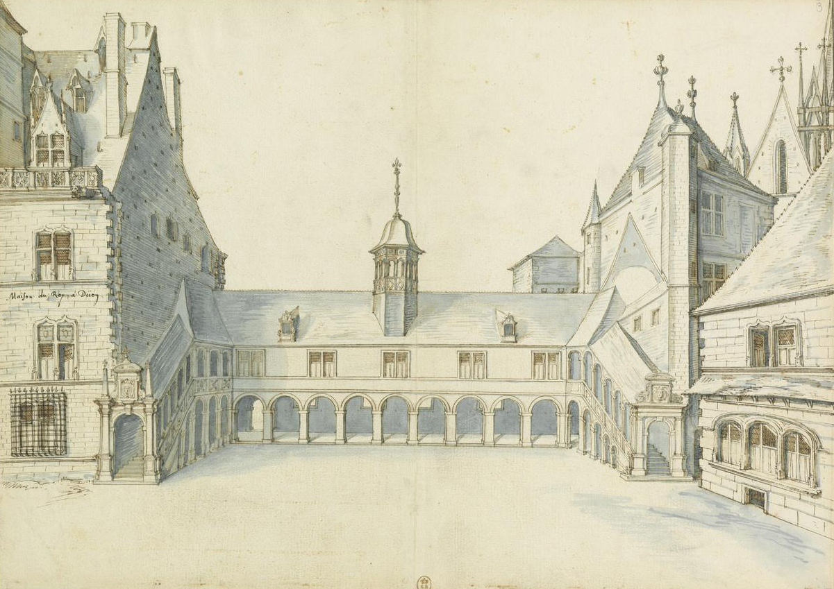 Maison du Roy à Dijon (1611) : Vue de la maison du roi à Dijon, dessin d’Étienne Martellange